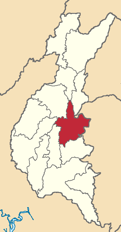 Mapa localizador del cantón en Los Ríos, Ecuador